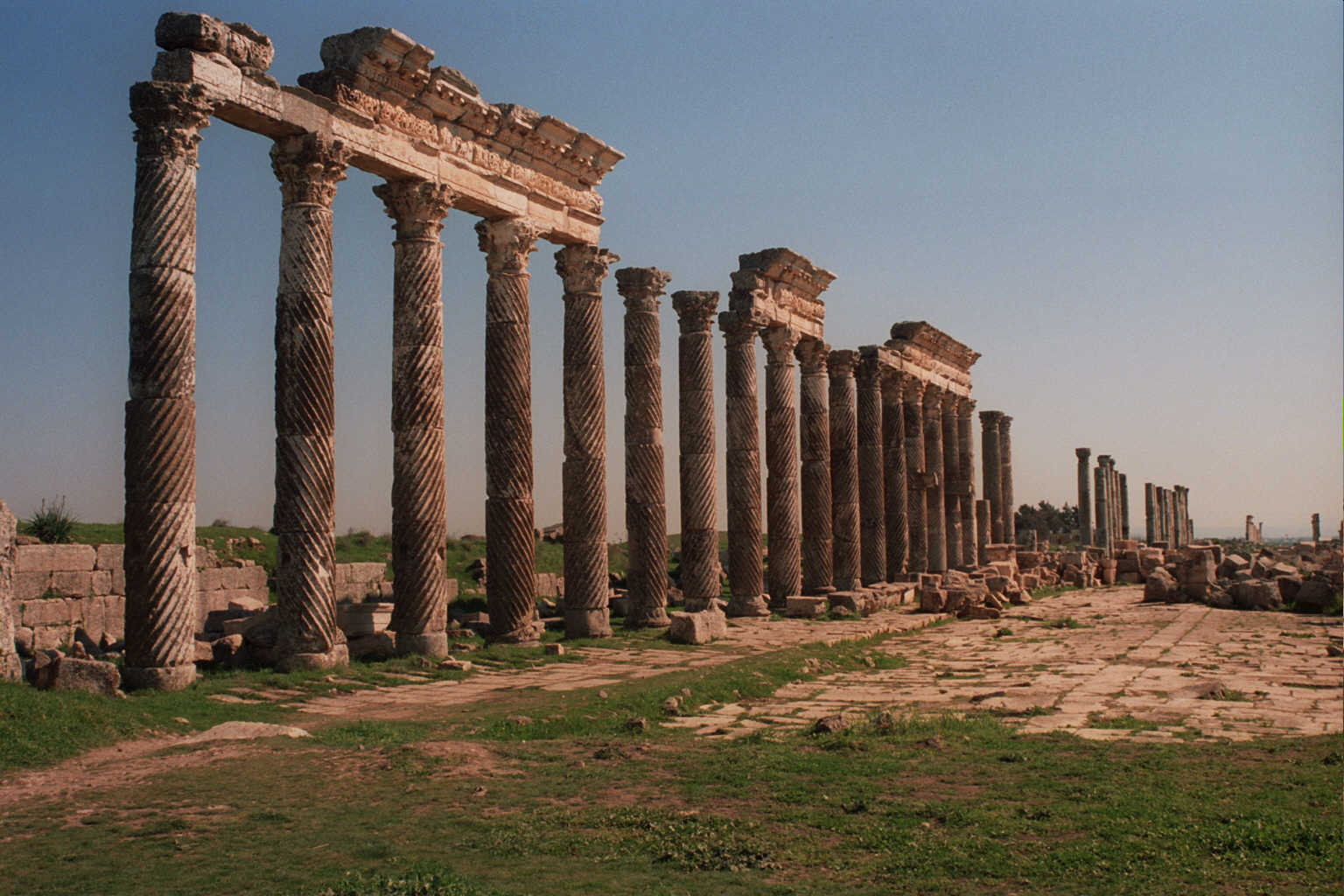 Viaggio in Siria 2005